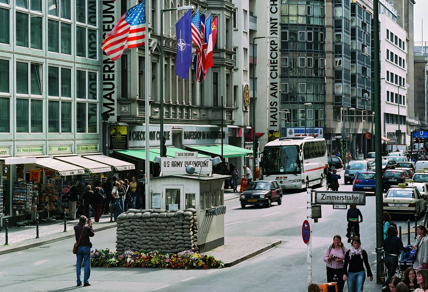 Alliierten Kontrollhäuschen und Mauermuseum - Museum Haus am Checkpoint Charlie